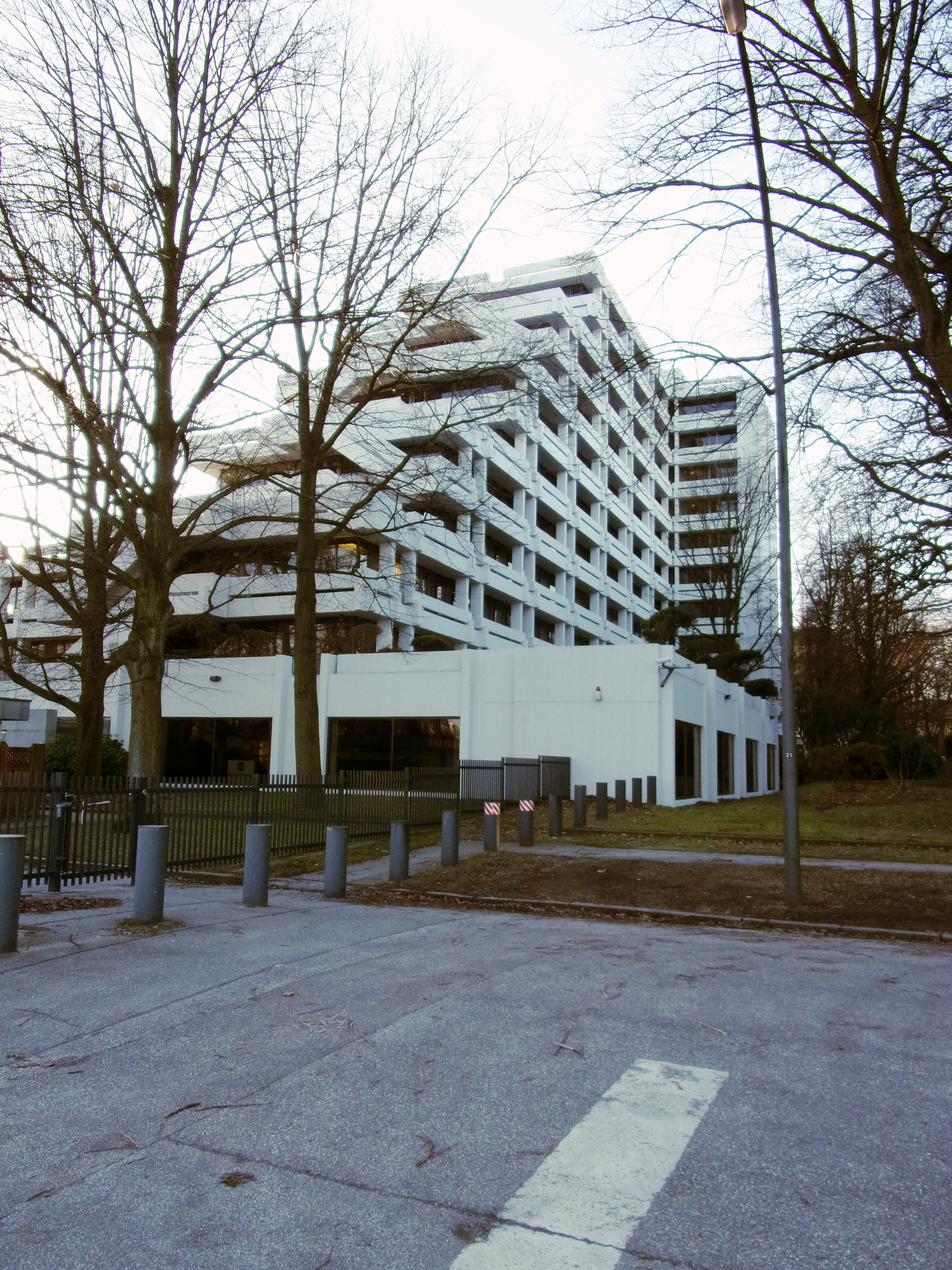 Denkmalgeschütztes Bürohaus Alsterufer 30 in Rotherbaum / Warburgstraße 50. Das Gebäude wurde zwischen 1972-73 erbaut, Architekten Rafeiner, F./Gnech, A./Schulze, Hass, Kummer. This is a photograph of an architectural monument.